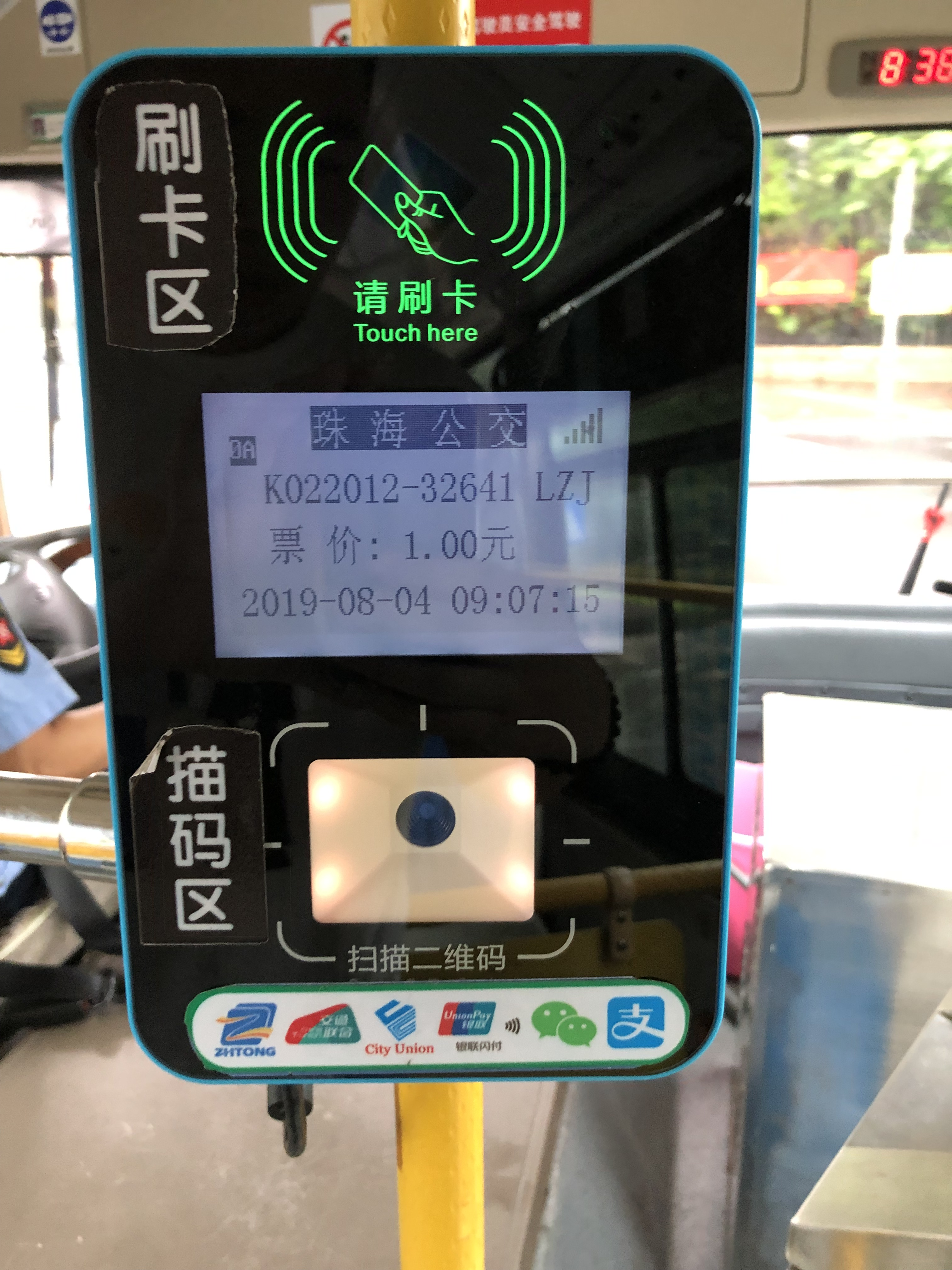 珠海公交新款刷卡機，支援多種支付方式支付車費。